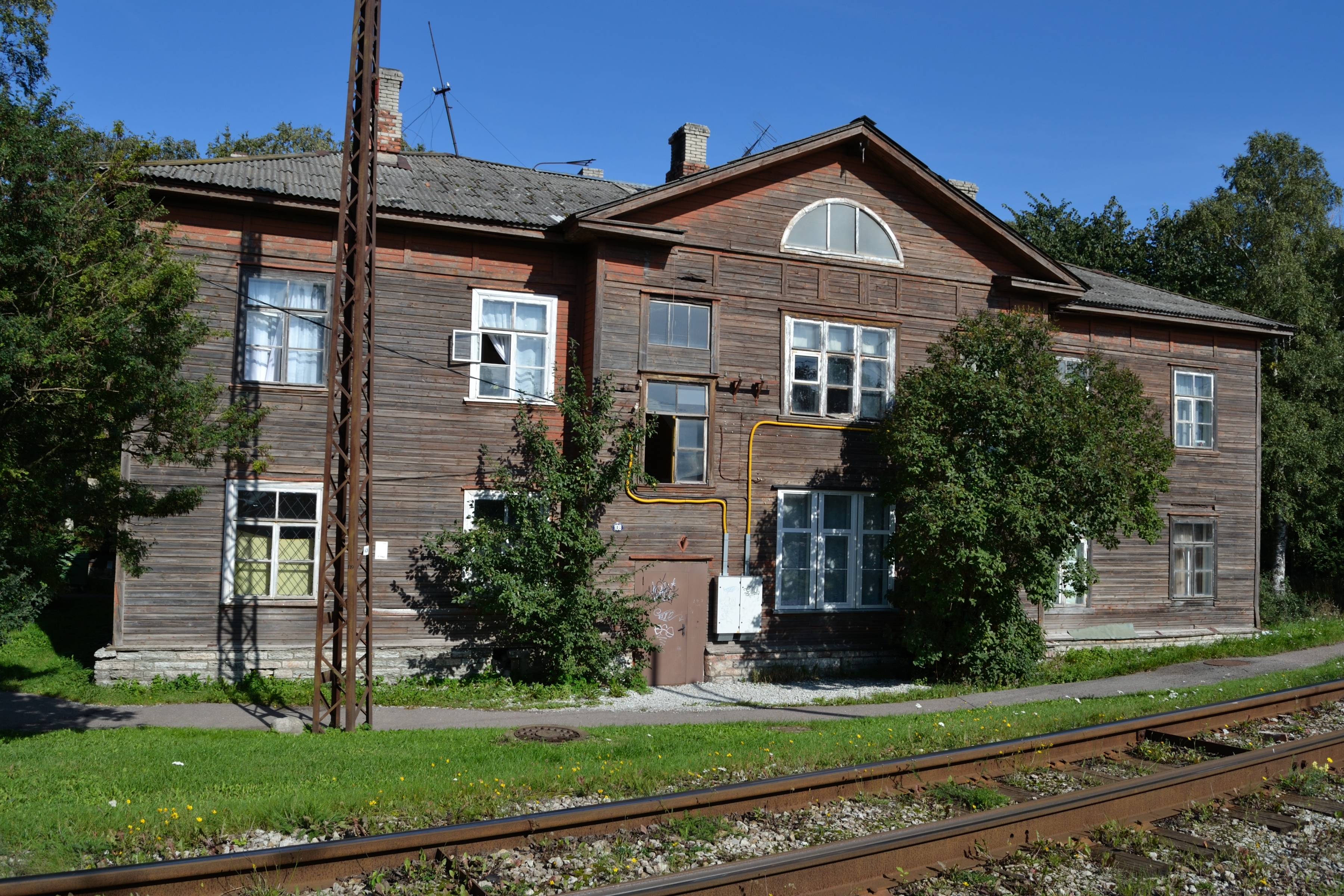 Tallinn, Vene-Balti laevatehase politseijaoskond, 1914